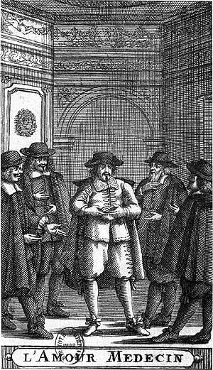 Frontispice de l'édition de 1682.